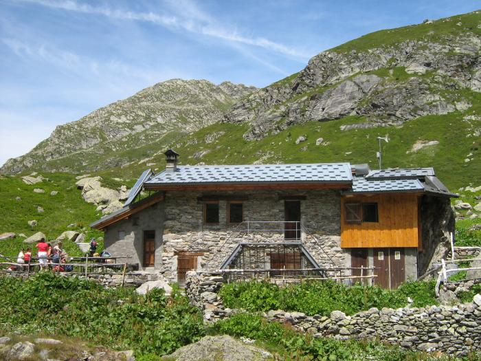 Vue du refuge du Ruitor